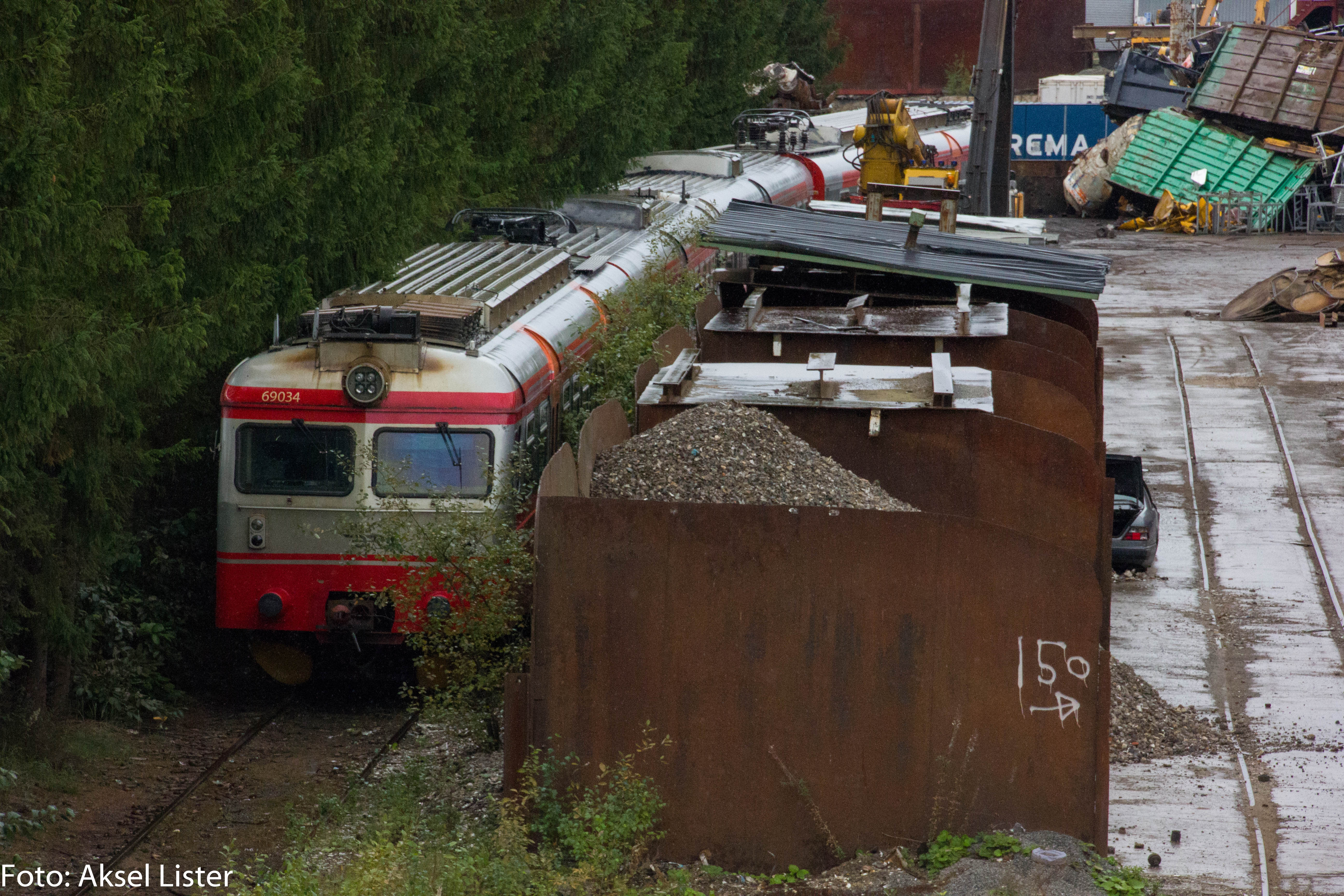 BM 69B 034 og 033 venter på å bli hogd hos Hellik Teigen, Hokksund.